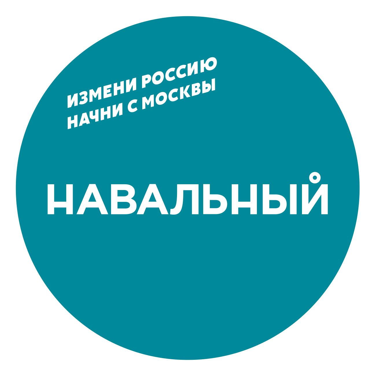 Логотип избирательной кампании Алексея Навального в качестве кандидата на должность Мэра Москвы, 2013 год